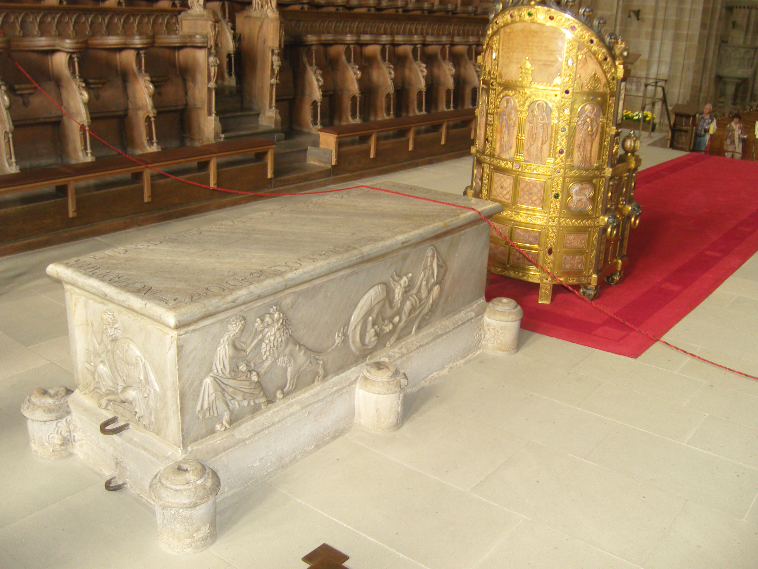 Bamberger Dom; Sarkophag und Bischofsstuhl im AltarraumThis is a photograph of an architectural monument.